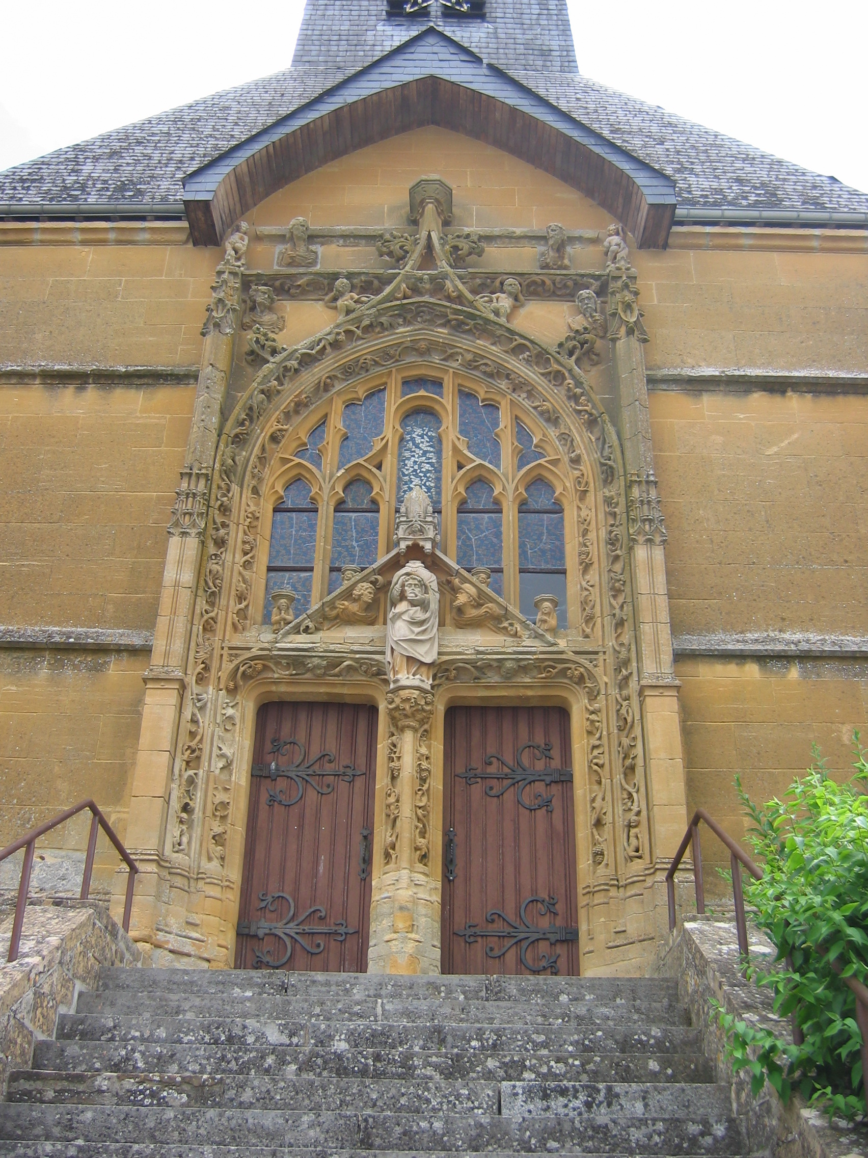 Eglise de Falaise en Ardennes France